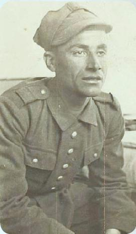 Jan Łożański w mundurze